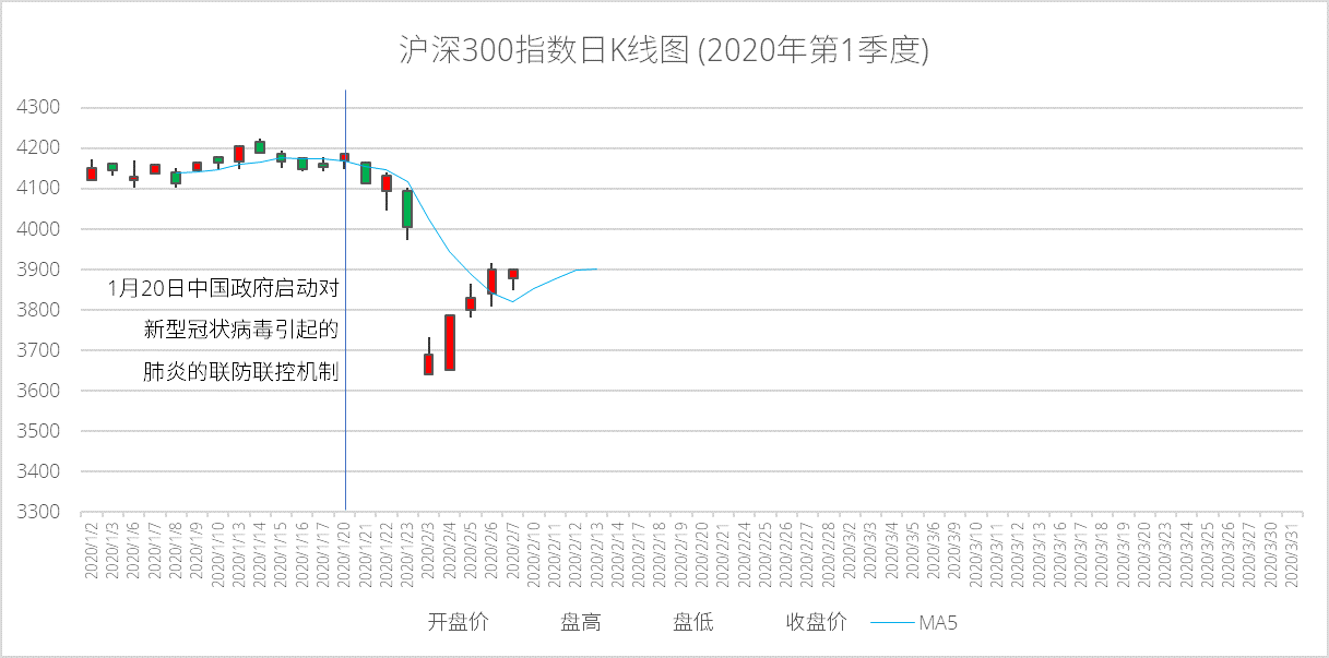 中文（中国大陆）: 新型冠状病毒引发的肺炎疫情期间沪深300指数的走势，可见疫情对股市的影响